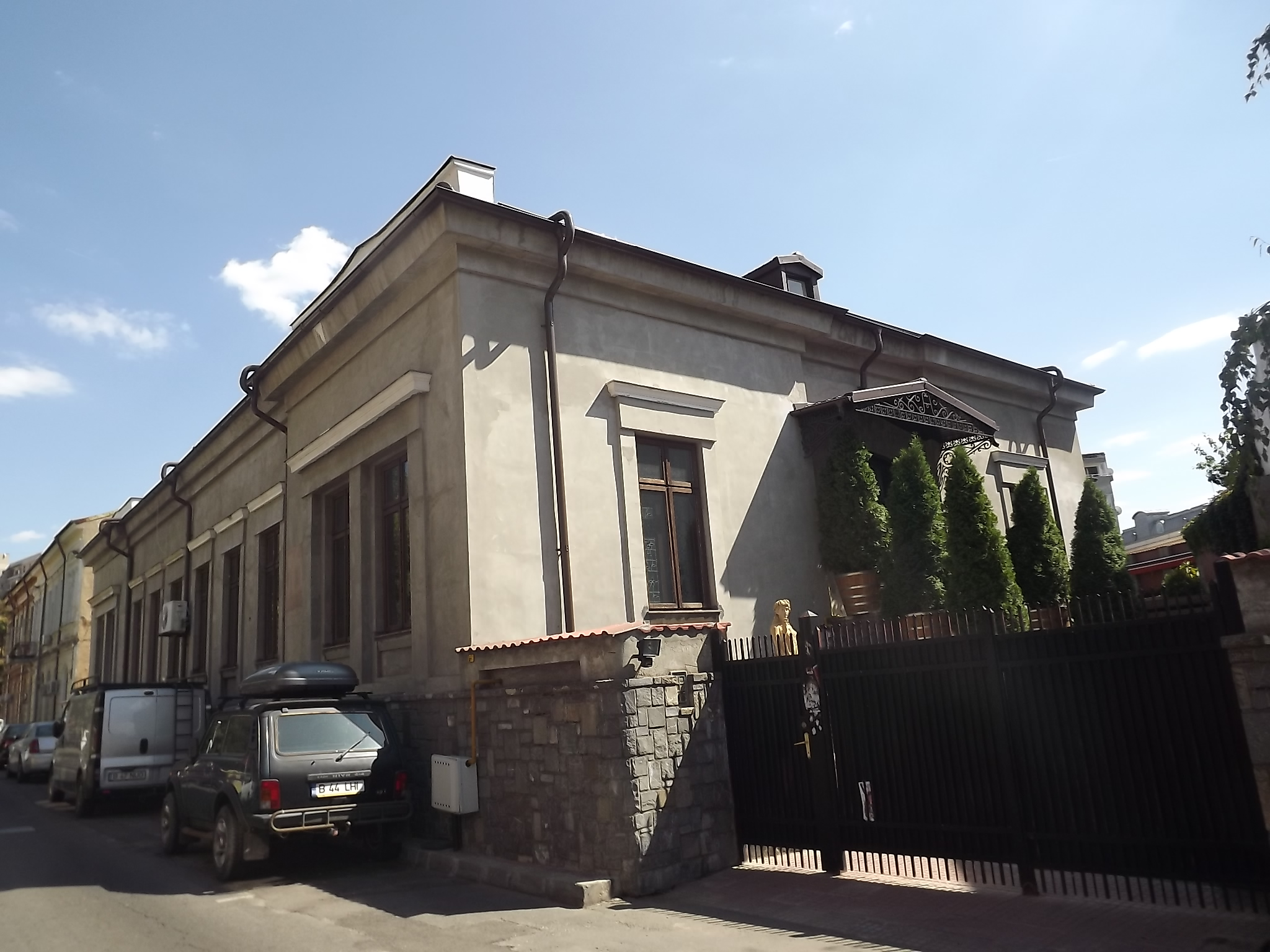 Casă 28